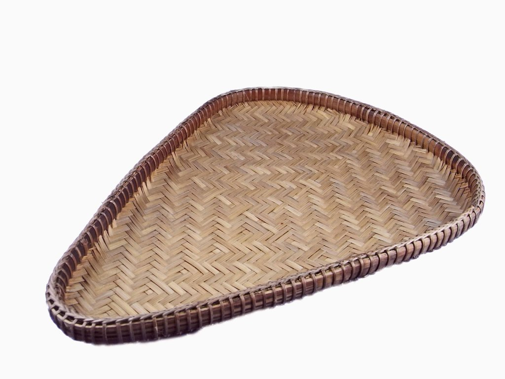 Nyiru